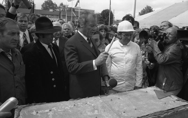 SPD-Bundesvorsitzender Willy Brandt legt Grundstein für die neue Bundeszentrale der SPD in der Erich-Ollenhauer-Straße, Bonn